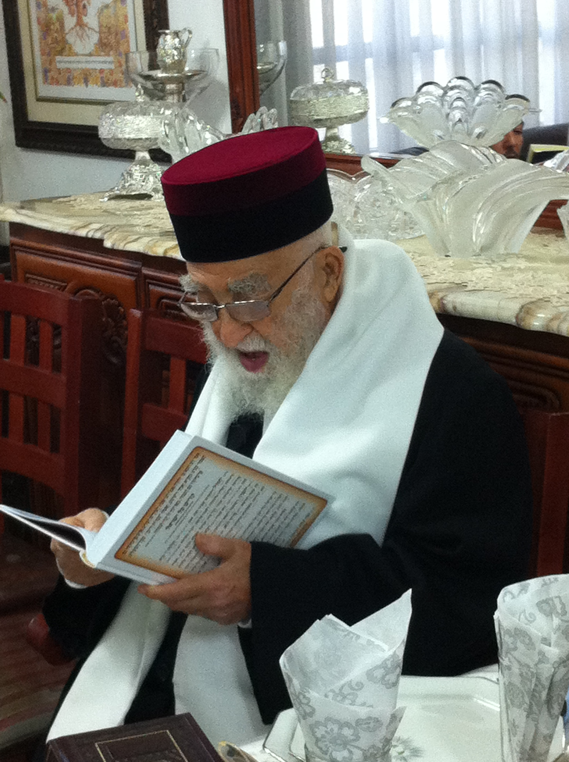 הרב יהושע מאמאן זקן רבני מרוקו חבר בית הדין הרבני הגדול לערעורים בירושלים - לשעבר